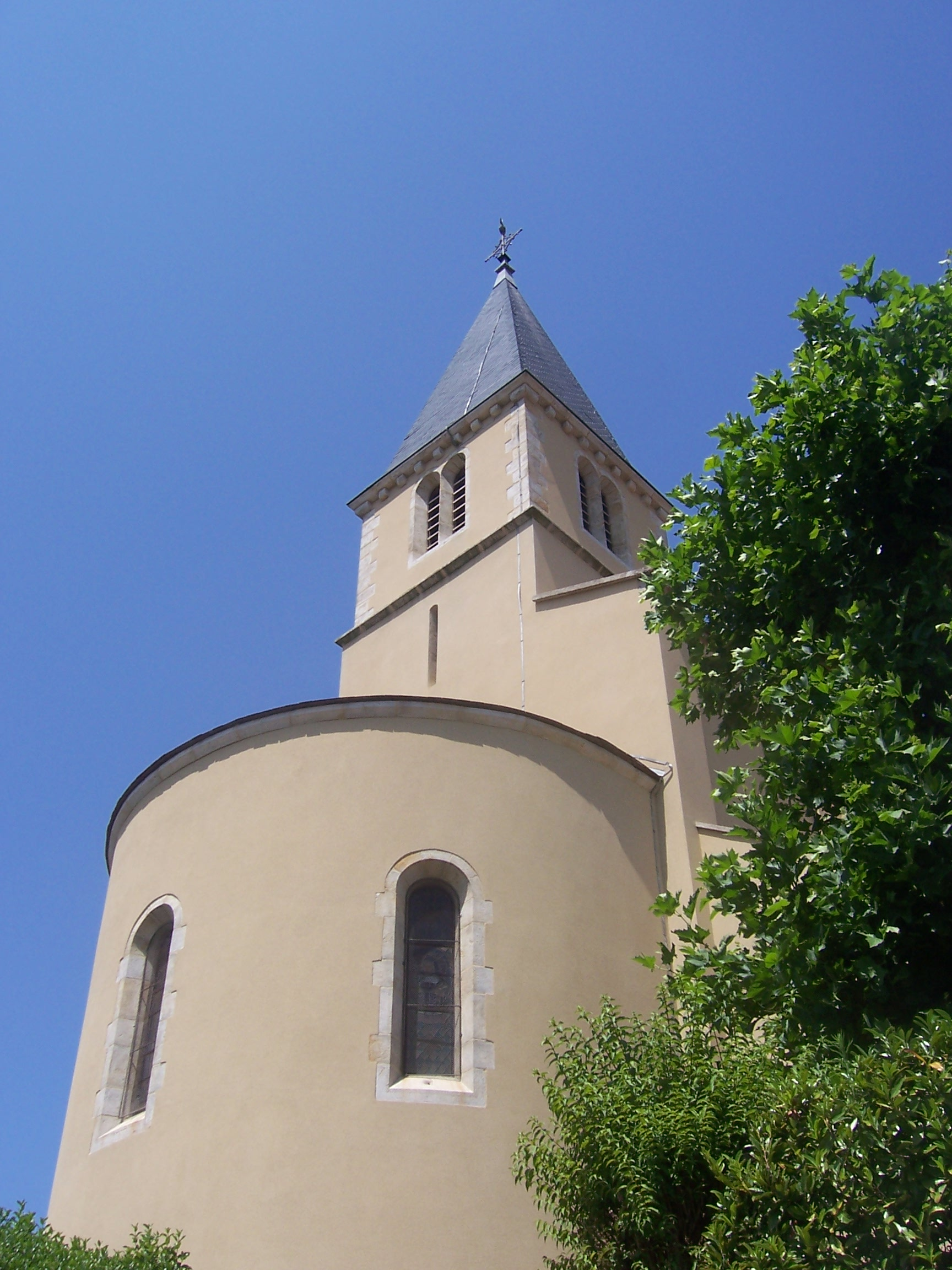 Eglise de Pouilloux